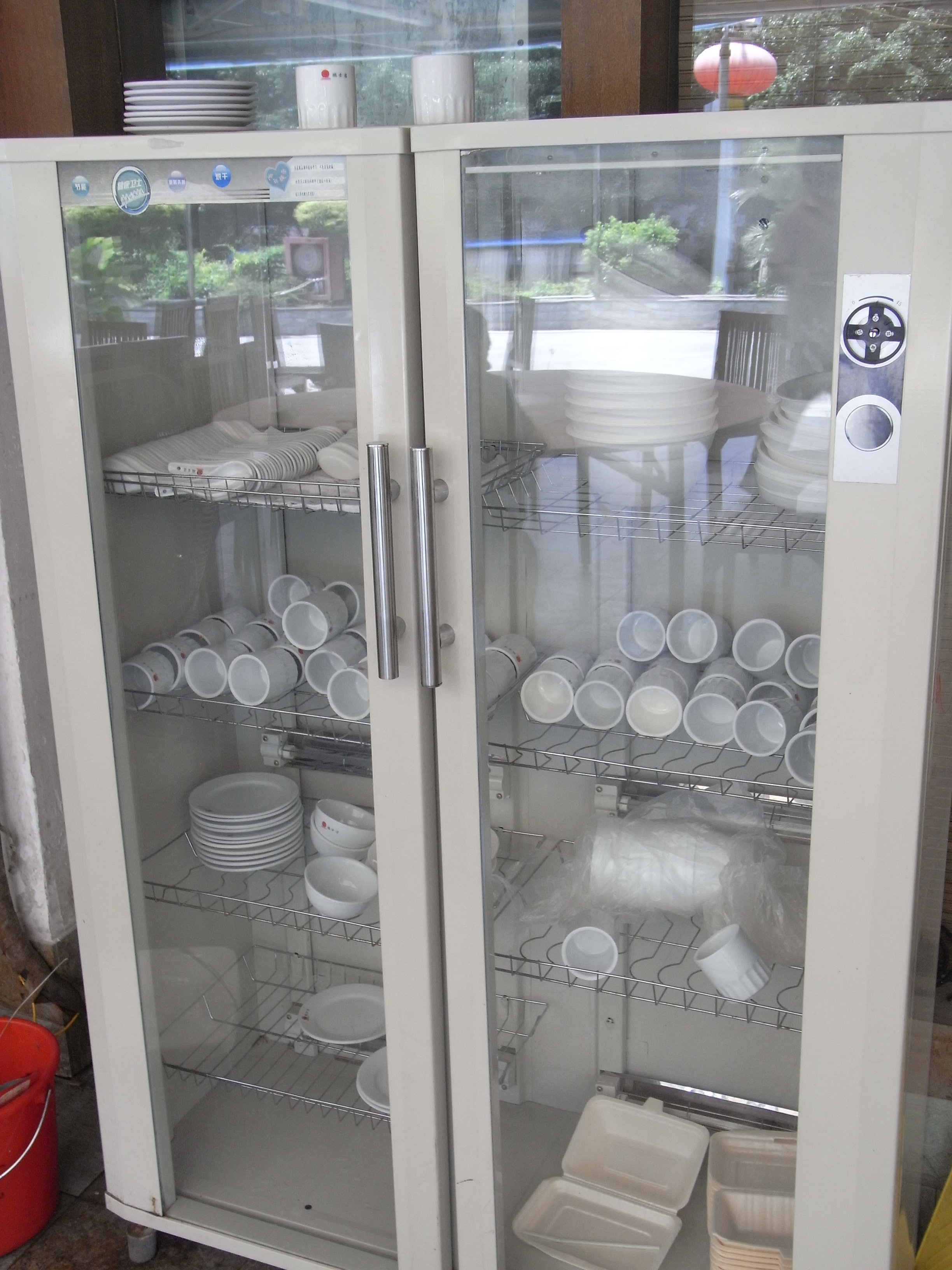 中文（香港）: 深圳 餐廳